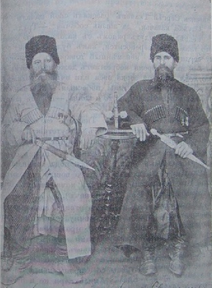 Кубанские казаки Яков Сотников (слева) и Сергей Севастьянов (справа). Участники обороны баязетской цитадели во время Русско-турецкой войны 1877―1878 годов. Кавалеры Георгиевского креста.